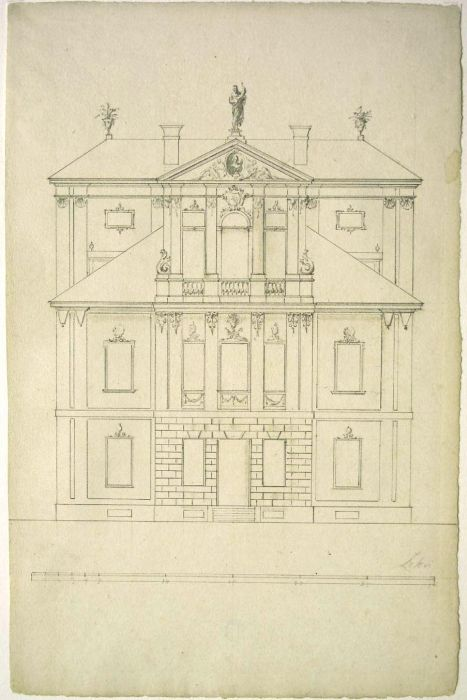 Kotowski Palace in Warsaw, design by Tylman Gamerski (van Gameren)